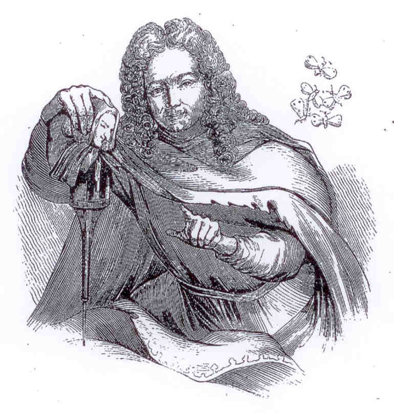 Portrait de Francois Aymon 1er, généralissime du Régiment de la Calotte, société festive et carnavalesque parisienne fondée en 1702.